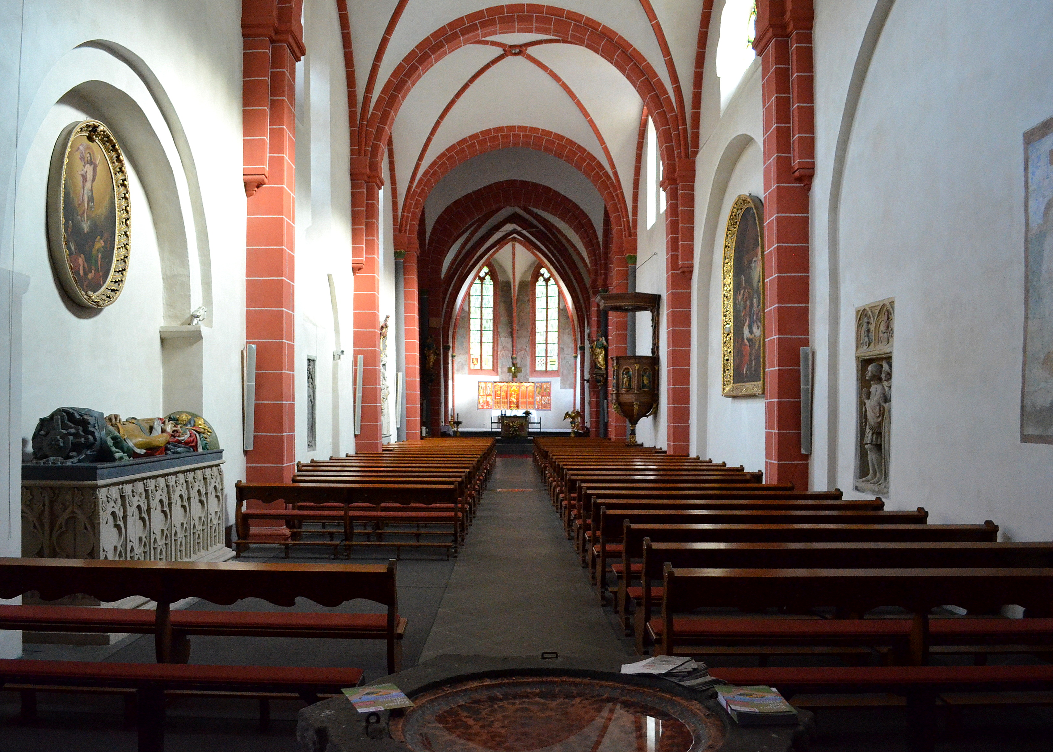 interieur